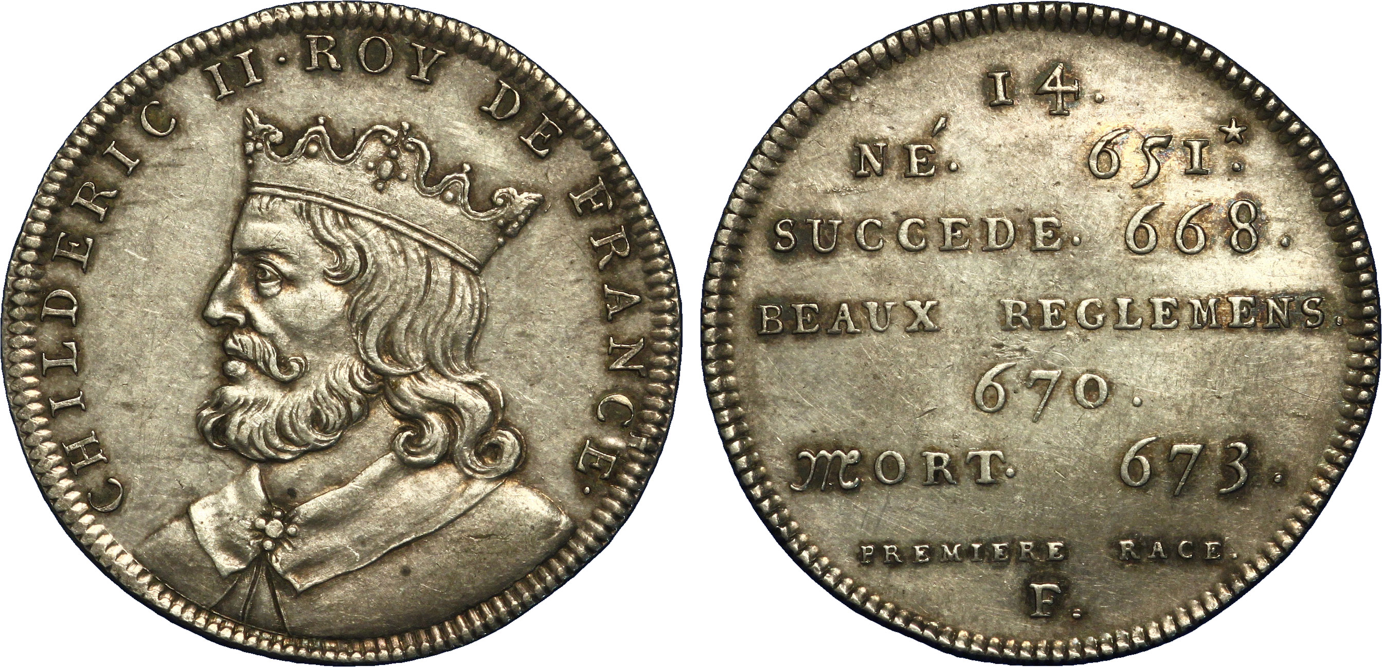 Métal : argent Diamètre : 32mm Axe des coins : 6h. Poids : 10,88g. Tranche : cannelée Degré de rareté : R2 Titulature avers : CHILDERIC II ROY DE FRANCE. Description avers : Buste imaginaire drapé et couronné à gauche. Titulature revers : 14- NÉ 651* - SUCCEDE 668 - BEAUX REGLEMENS 670 - MORT 673 - PREMIERE RACE / F.. Description revers : en neuf lignes.